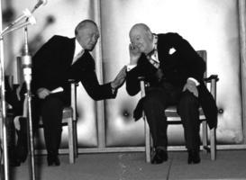 Sir W. Churchill erhält den Karls-Preis im Rathaus zu Aachen